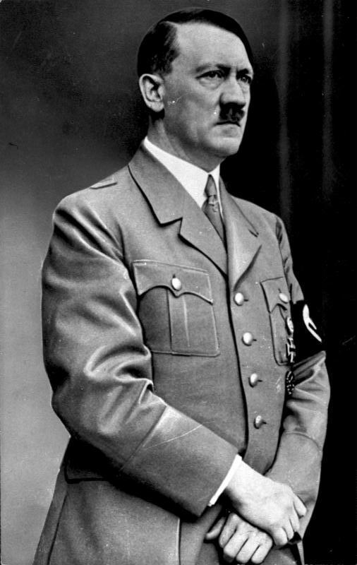 ADN-ZB Adolf Hitler, faschistischer Führer, Hauptkriegsverbrecher. geb. 20.4.1889 in Braunau (Inn), gest. (Selbstmord) 30.4.1945 in Berlin übernahm als Reichswehrspitzel 1921 die Führung der NSDAP; stand im November 1923 an der Spitze eines konterrevolutionären Putschversuchs in München (Hitler Putsch). Am 30.1.1933 wurde Hitler Reichskanzler; damit begann die Errichtung der Diktatur des reaktionärsten und aggresivsten Teils der deutschen Finanzbourgeoisie. Am 2.8.1934 wurde er Nachfolger Hindenburgs als Staatsoberhaupt; 1938 Oberbefehlshaber der Wehrmacht. Als Werkzeug des deutschen Imperialismus konzipierte Hitler Wege und Methoden, um dessen Aggressionsziele und Weltherrschaftsziele durchzusetzen. UBz: Porträtaufnahme vom 20.4.1937. 2754-49 [Adolf Hitler (Porträt)] Abgebildete Personen: Hitler, Adolf: Reichskanzler, Deutschland